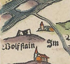 Ausschnitt aus Tafel 15 der Bairischen Landtafeln von Philipp Apian (1568)